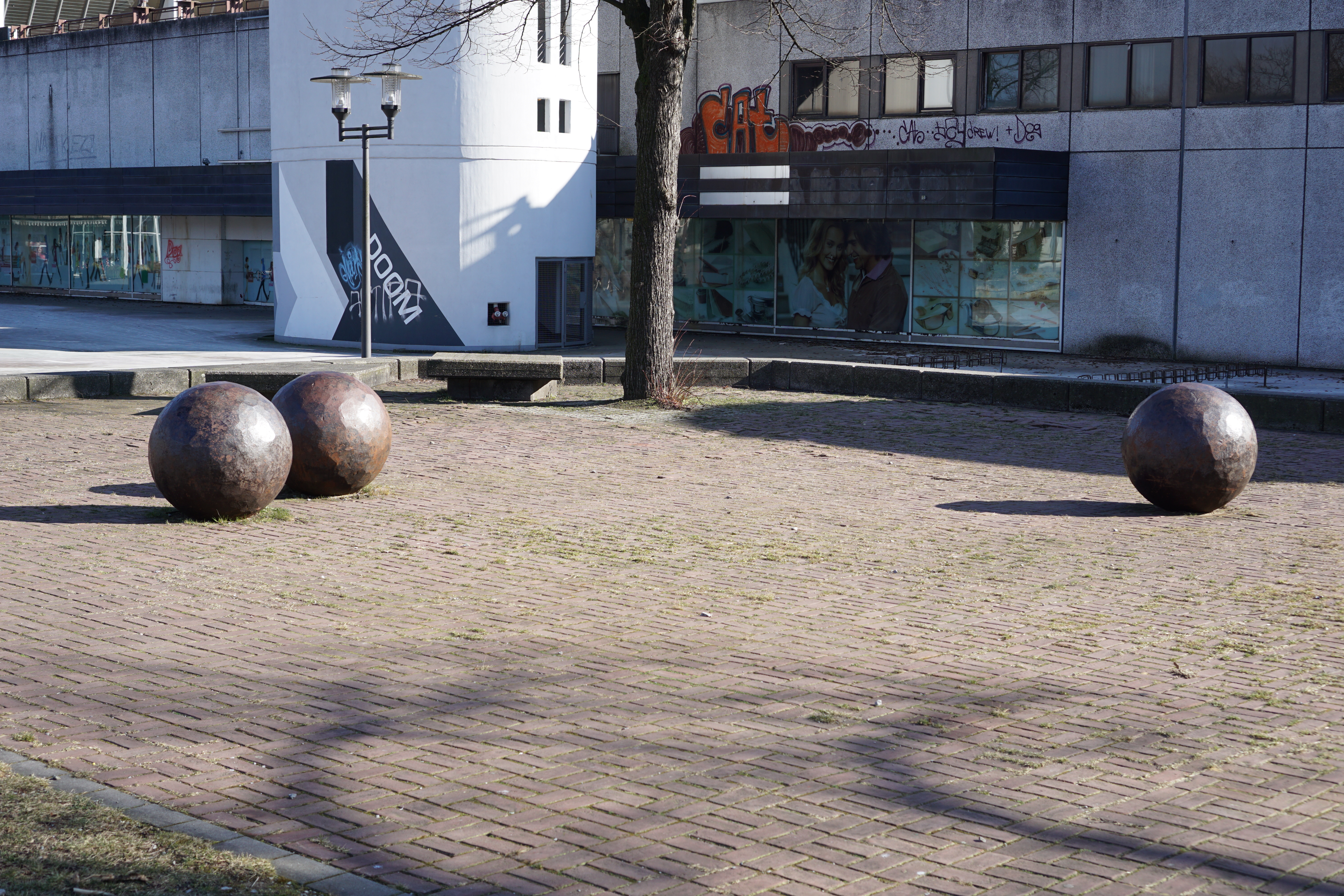 Ansgar Nierhoff, Polyeder, Marl